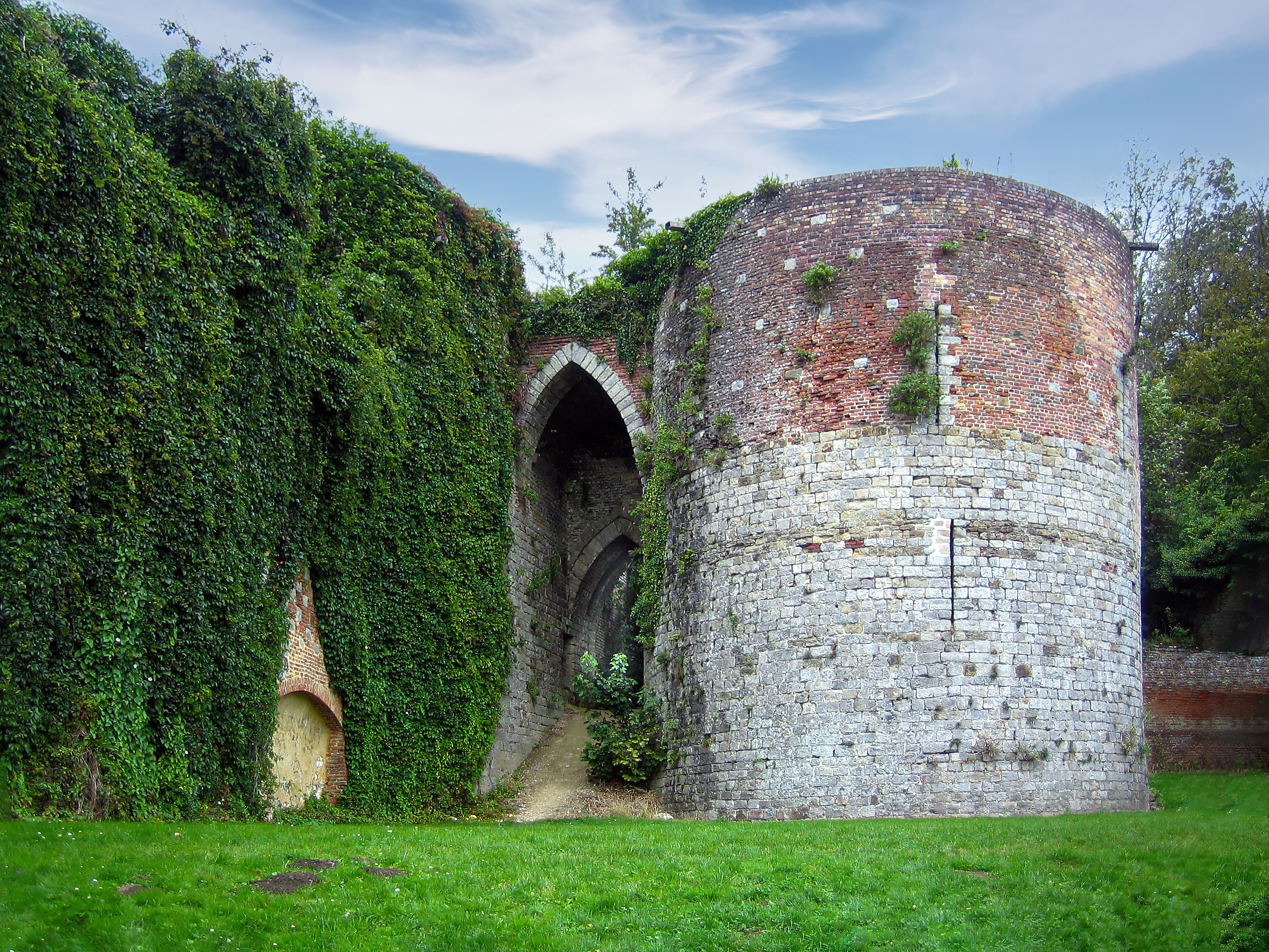 Tours dans la citadelle de Montreuil-sur-Mer